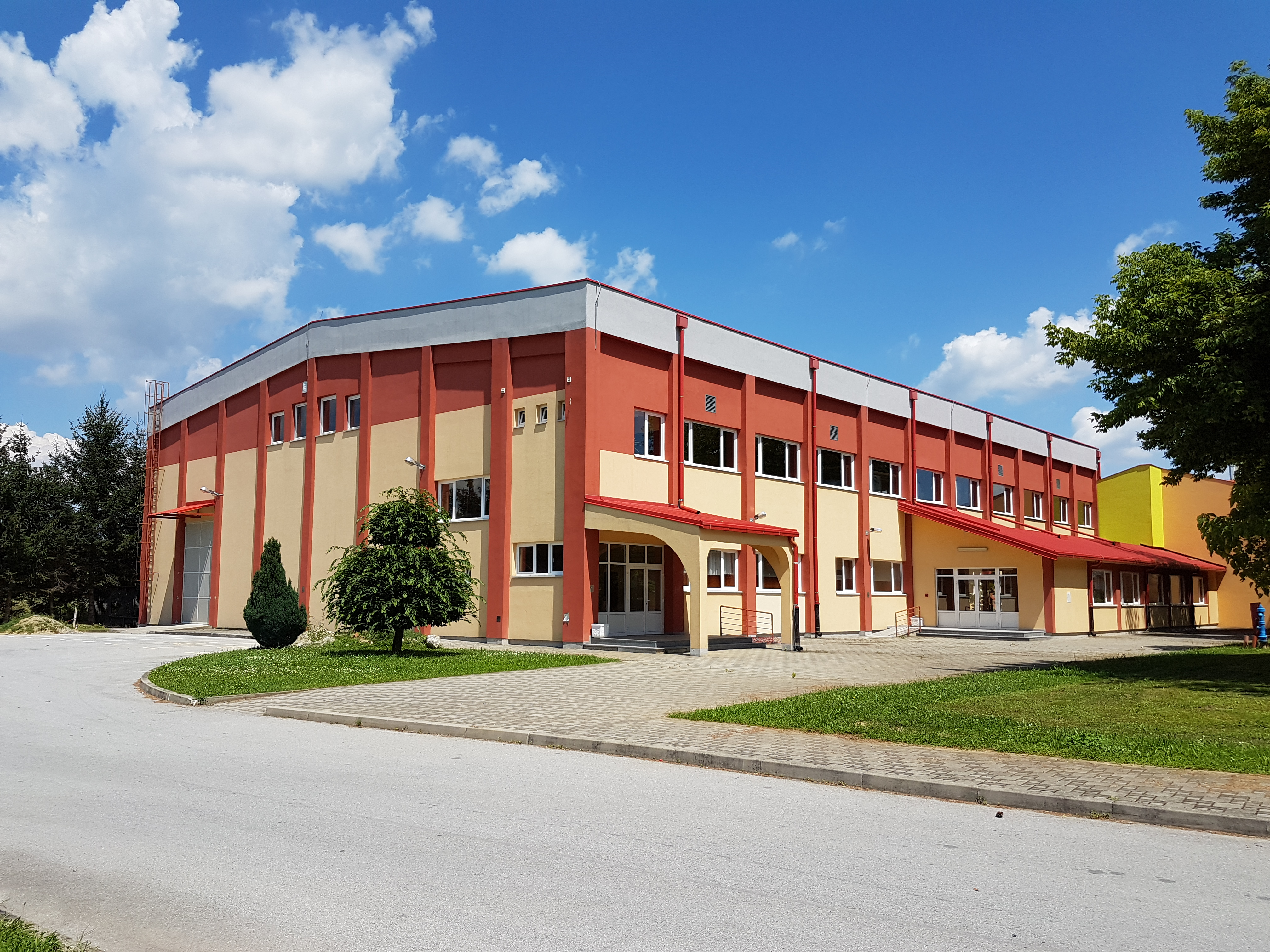 Sportska dvorana u Špišić Bukovici izgrađena 2009. godine